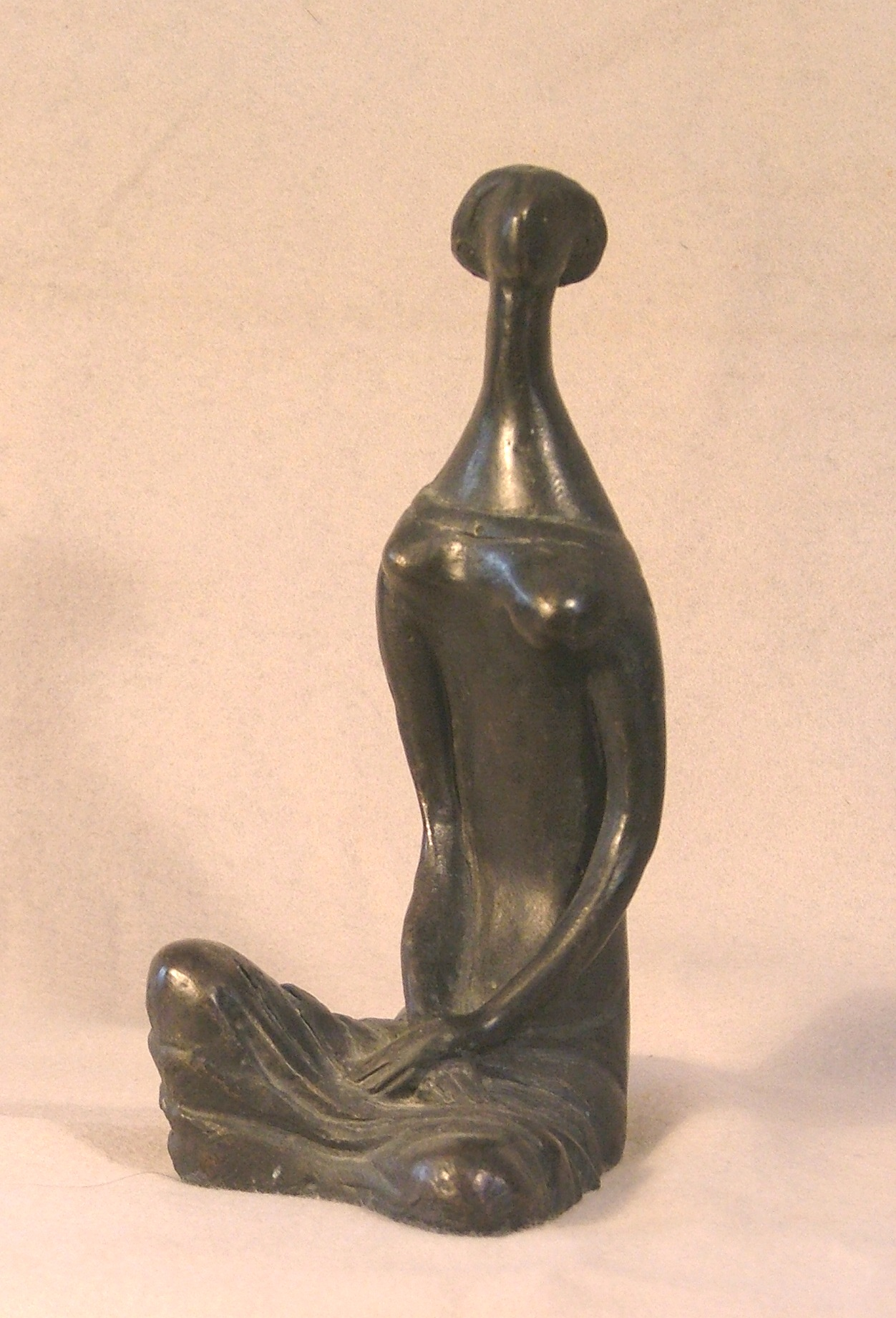 נערה יושבת, ברונזה